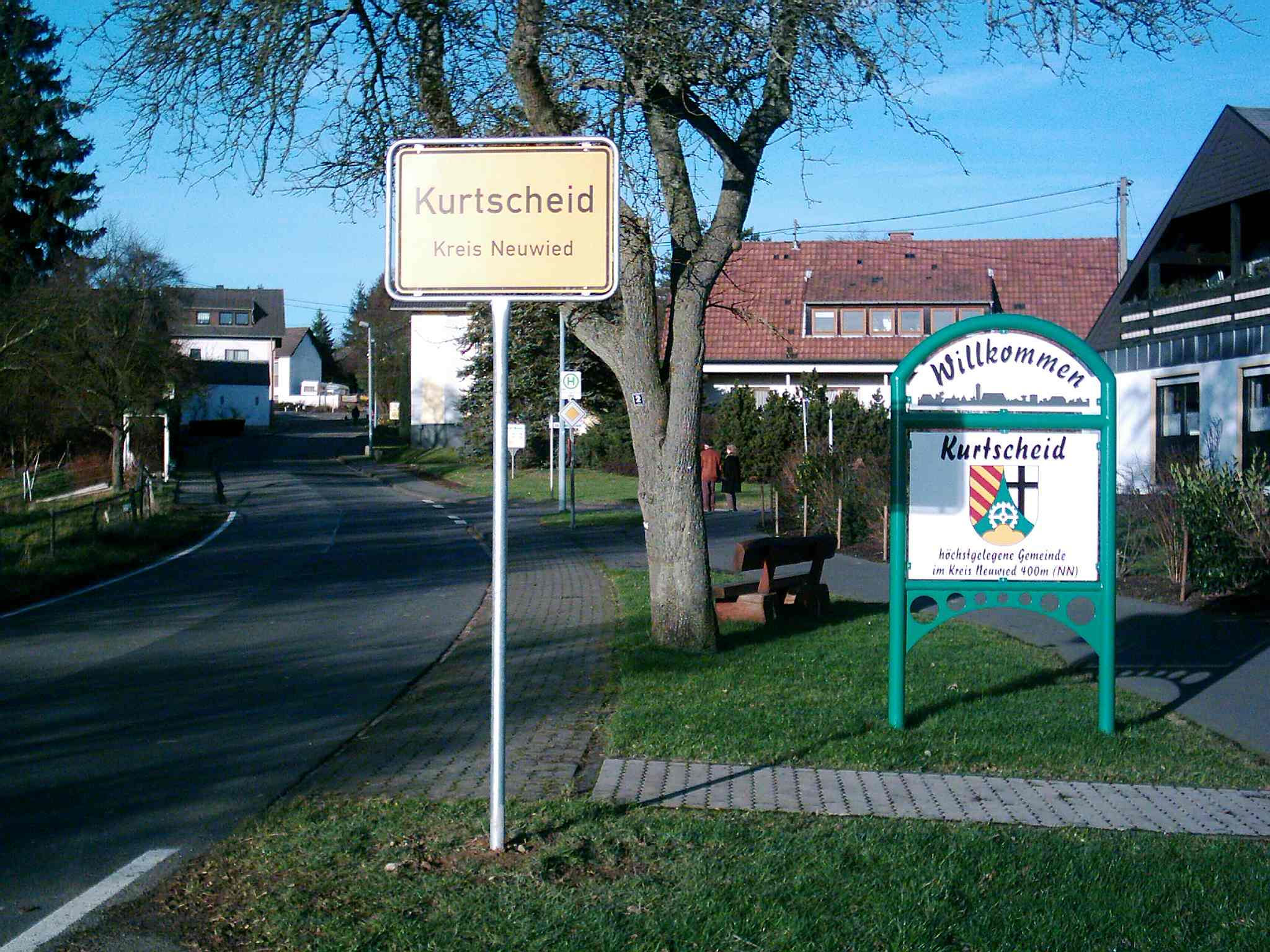 Kurtscheid